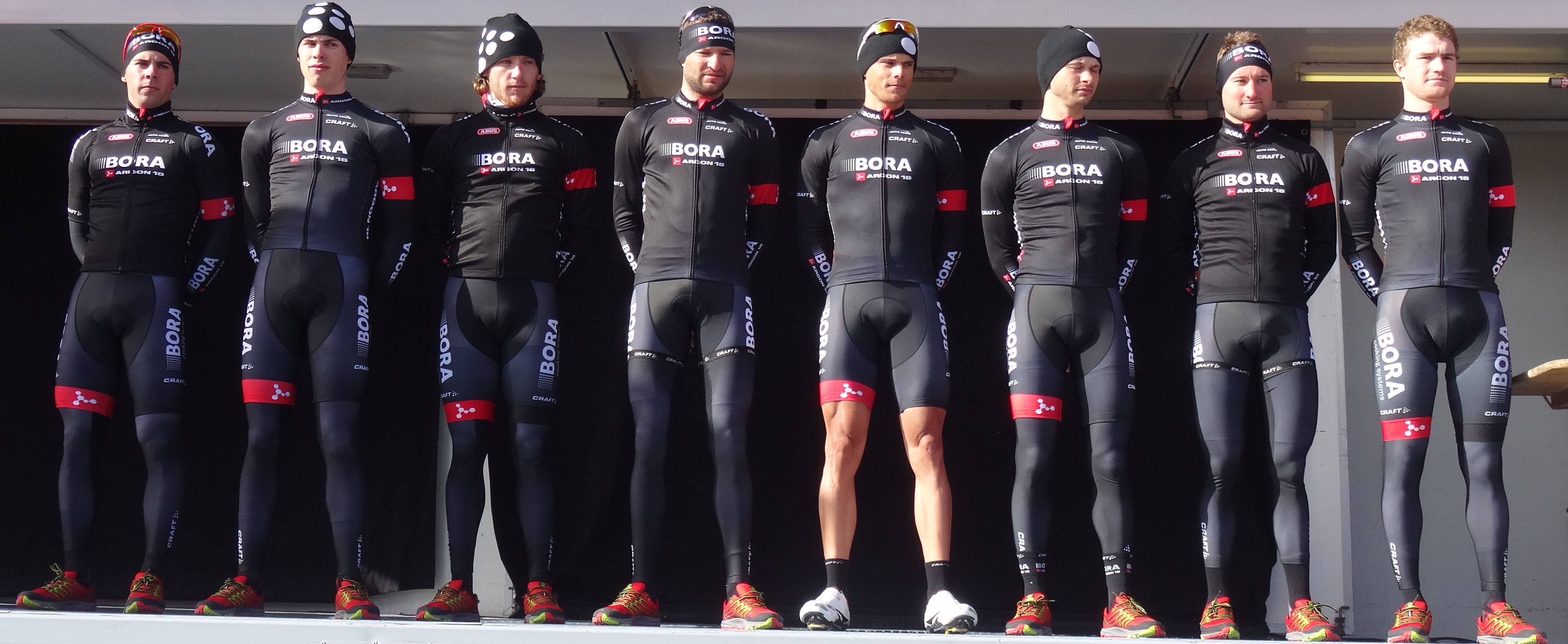 Reportage réalisé le mercredi 4 mars à l'occasion du départ du Samyn des Dames 2015 et du Samyn 2015 à Quaregnon, Belgique.